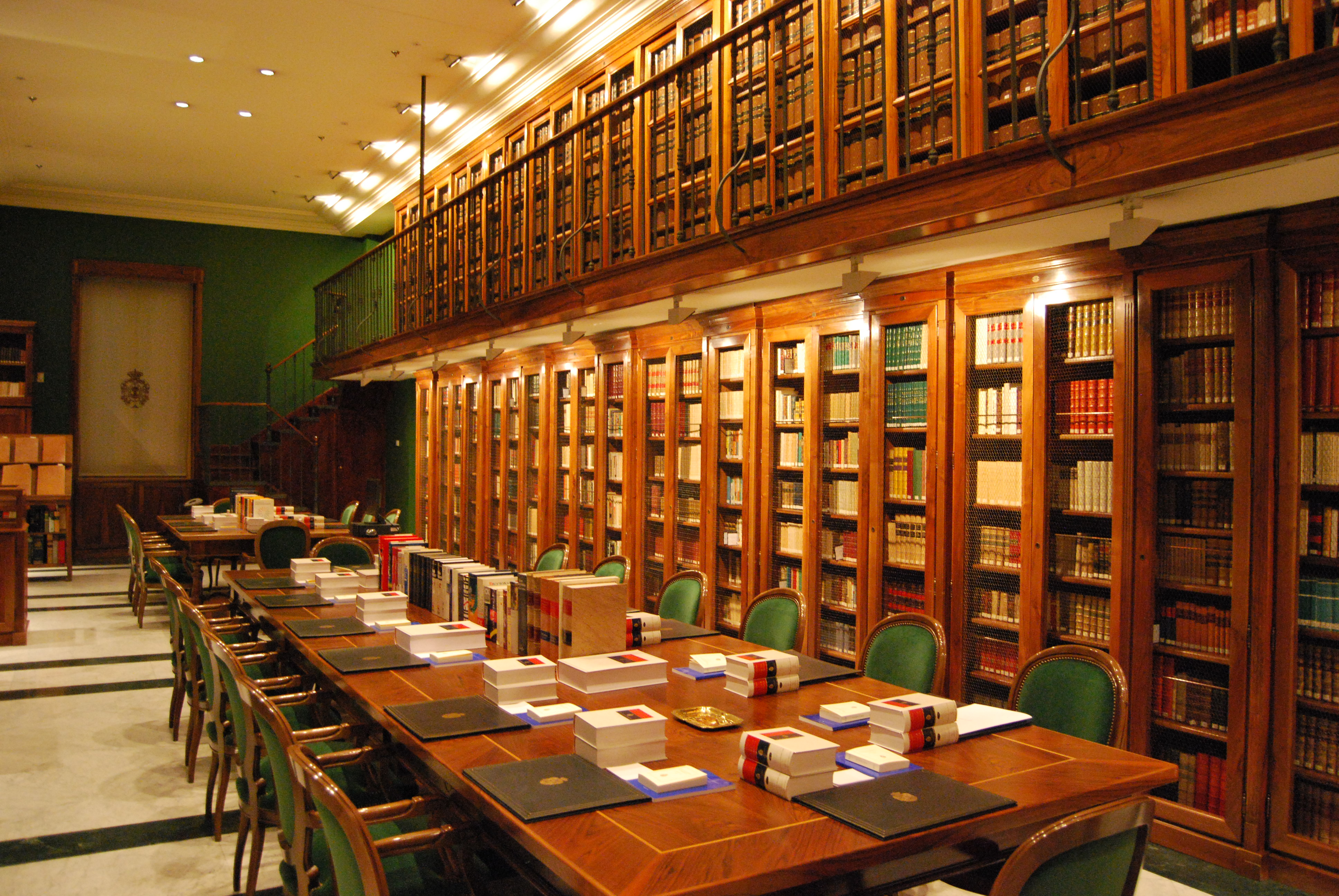 Vista general de una de las librerías de la RAE